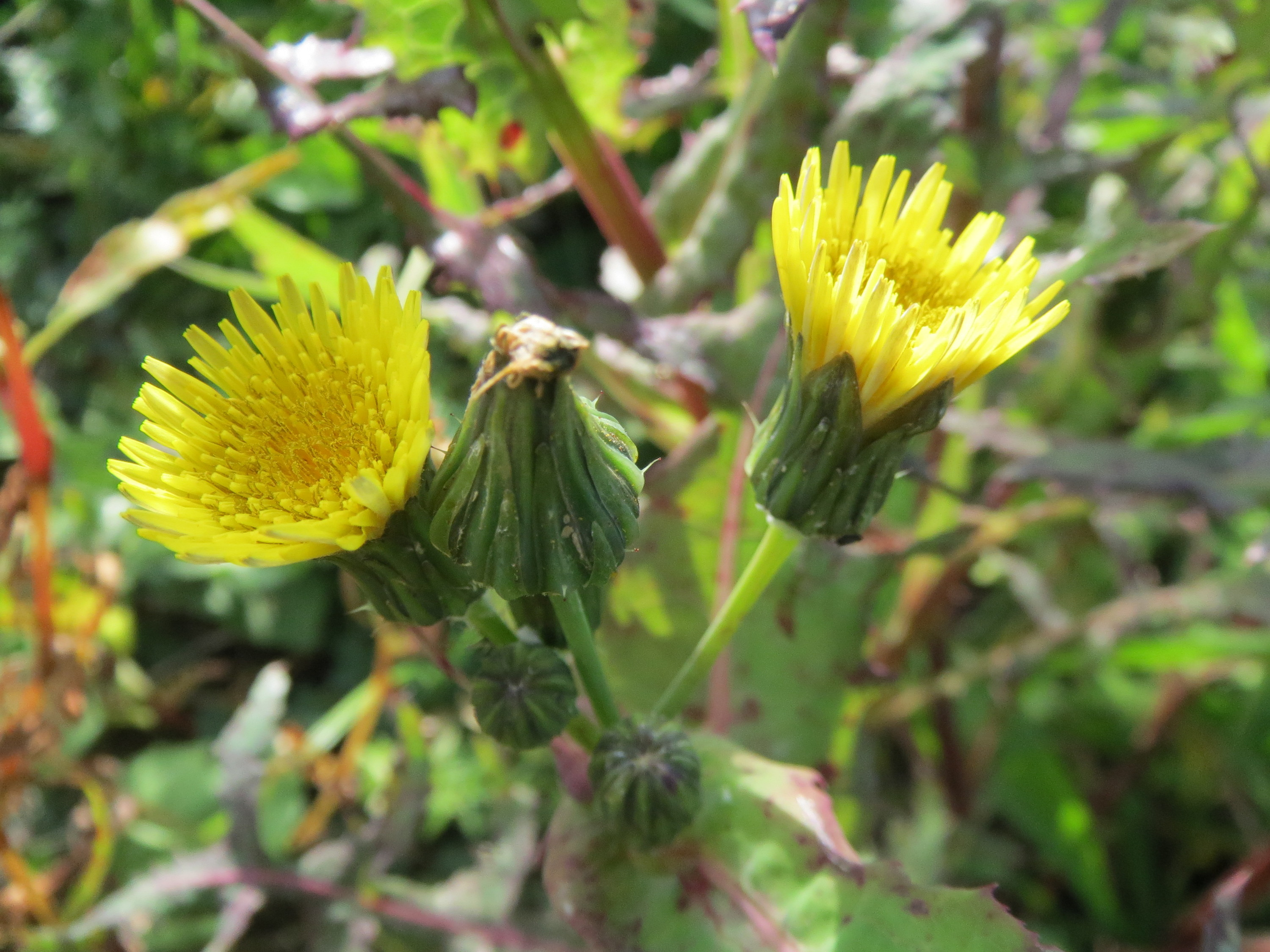 Raue Gänsedistel (Sonchus asper) in den Schwetzinger Wiesen